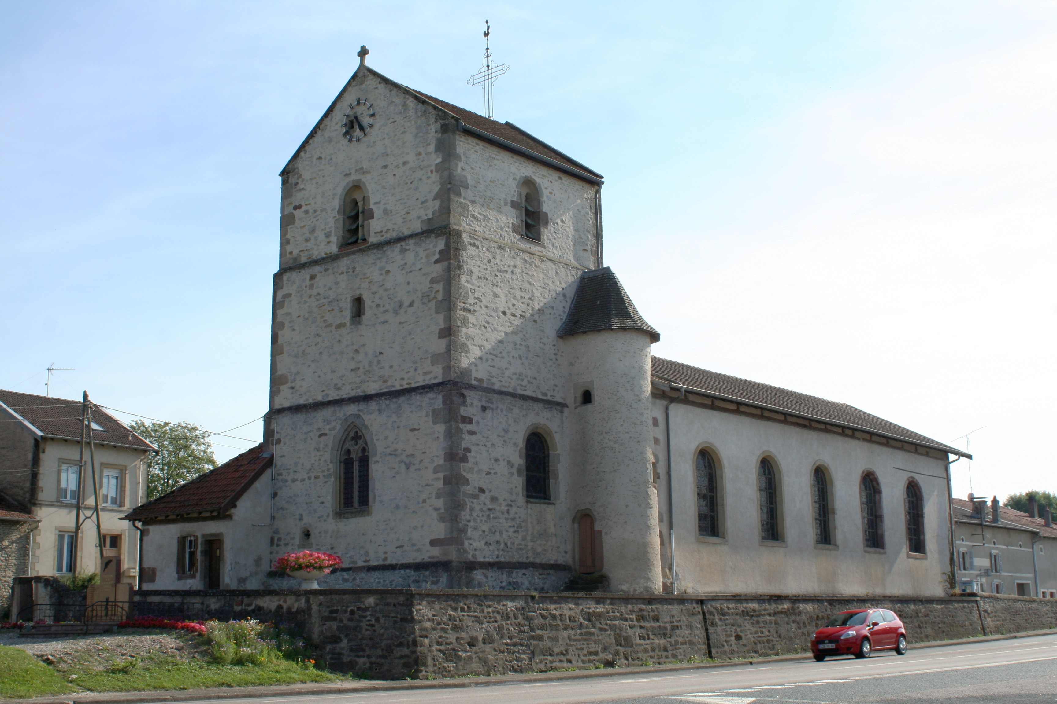 Église Saint-Èvre de Vomécourt (Vosges)